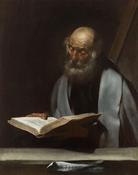 José de Ribera, Saint Jude Thaddée, vers 1609-1610, huile sur toile, 111,2 x 88,6 cm